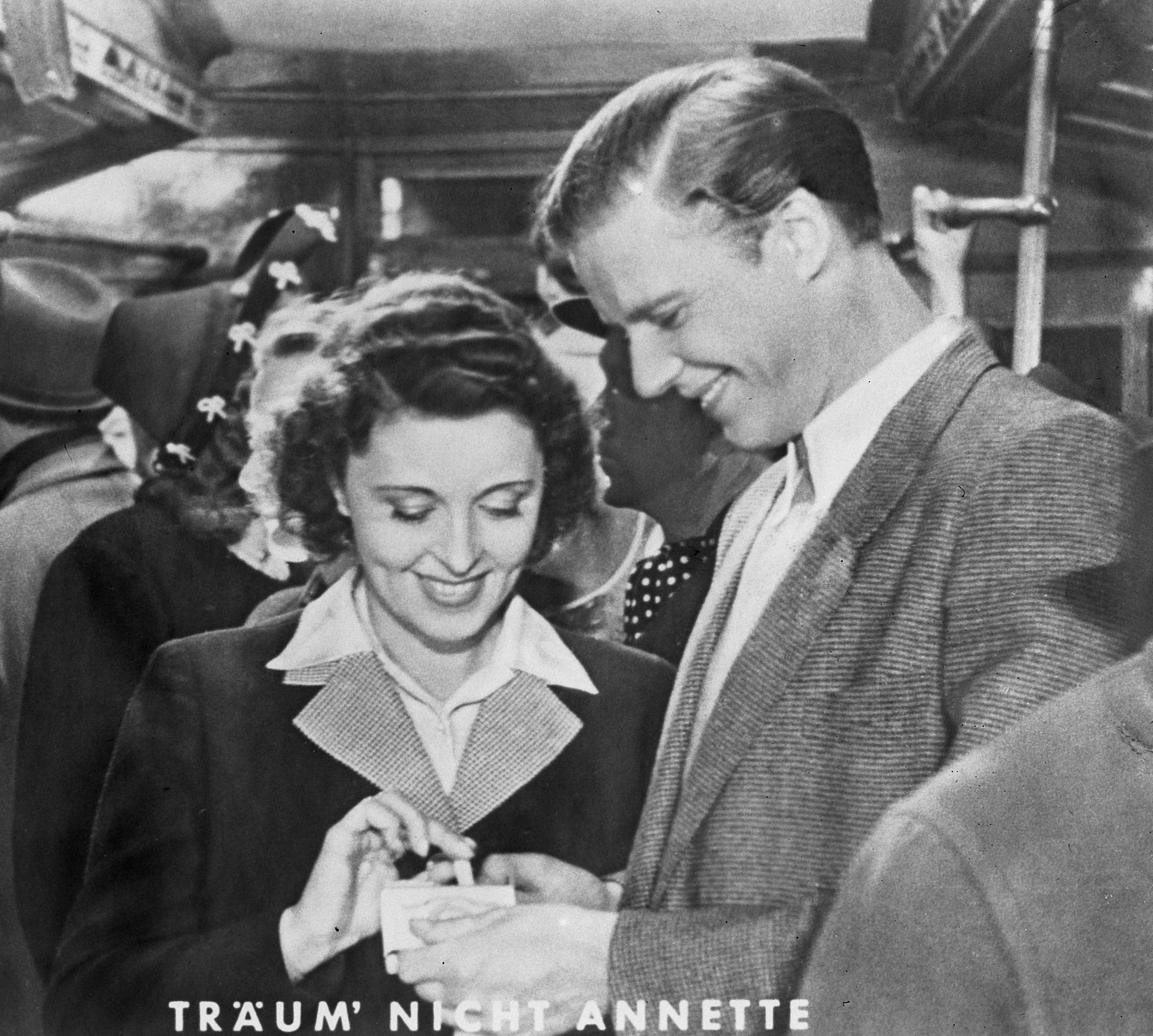 Filmfoto's Actueel. "Träum' nicht Annette"